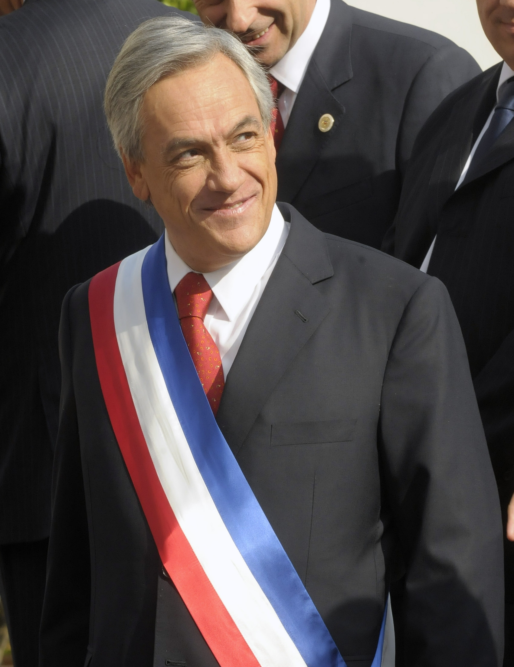 Foto del Presidente Sebastián Piñera Echenique